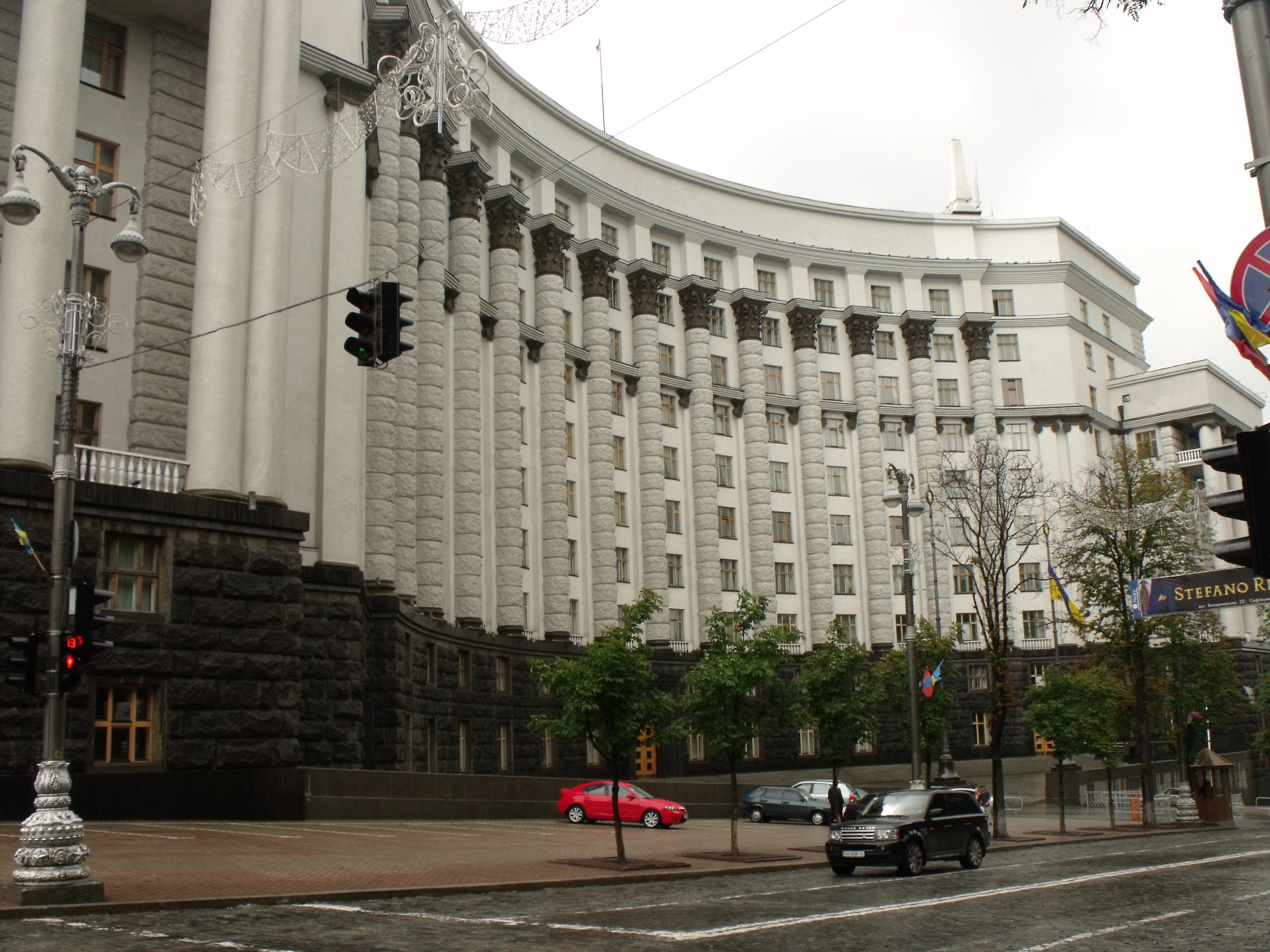 Будинок Ради народних комісарів УРСР (Будинок уряду України), Київ, Грушевського Михайла вул., 12/2